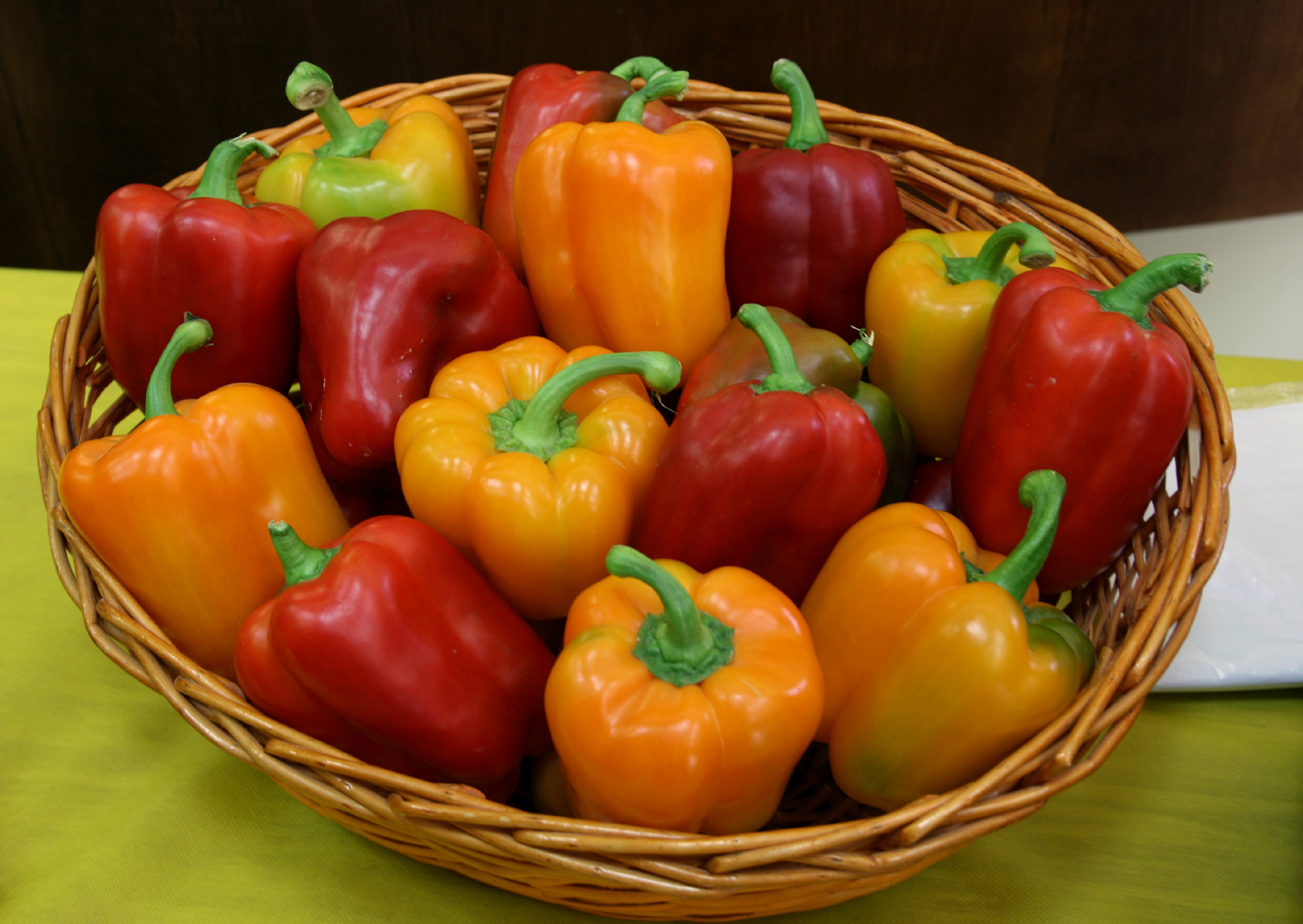 Corbeille de poivrons